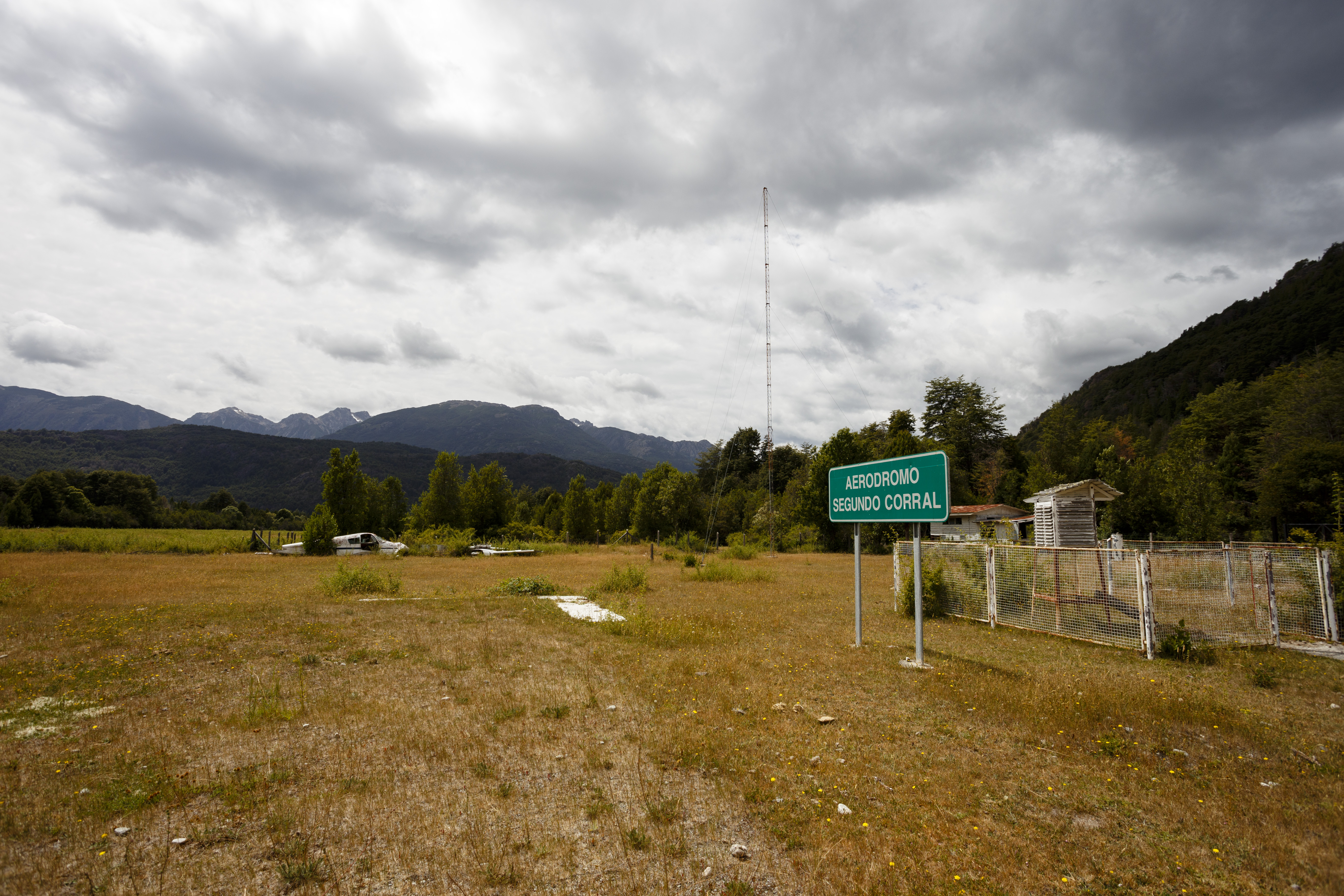 Aeródromo Segundo Corral, Cochamó, Chile.